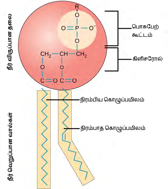 பொசுபோ லிப்பிட்டு மூலக்கூறொன்றின் கட்டமைப்பு